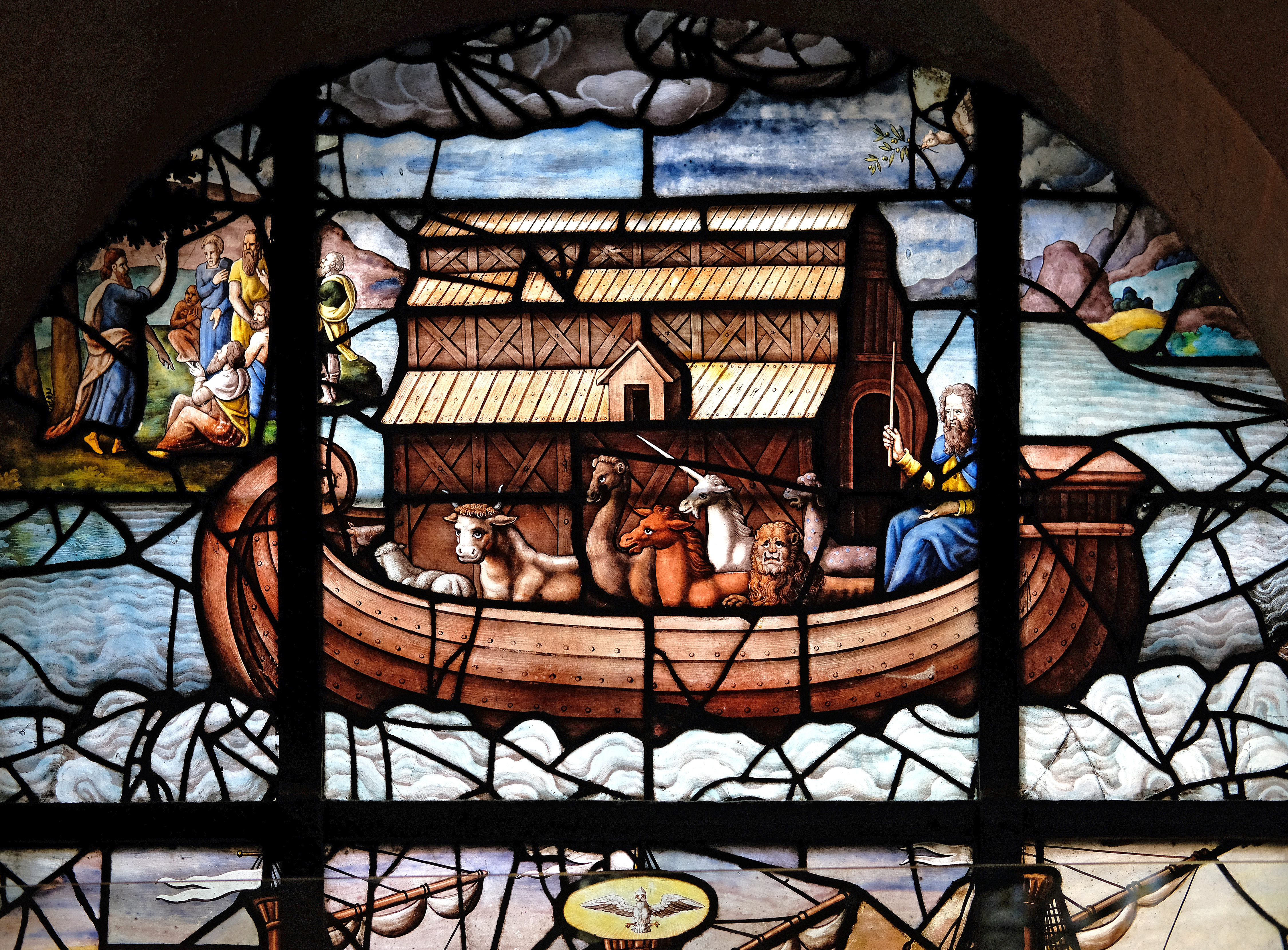 Église Saint-Étienne-du-Mont (vitrail "L'arche de Noé" de la chapelle de la Communion ou des Catéchismes - détail) - Paris V